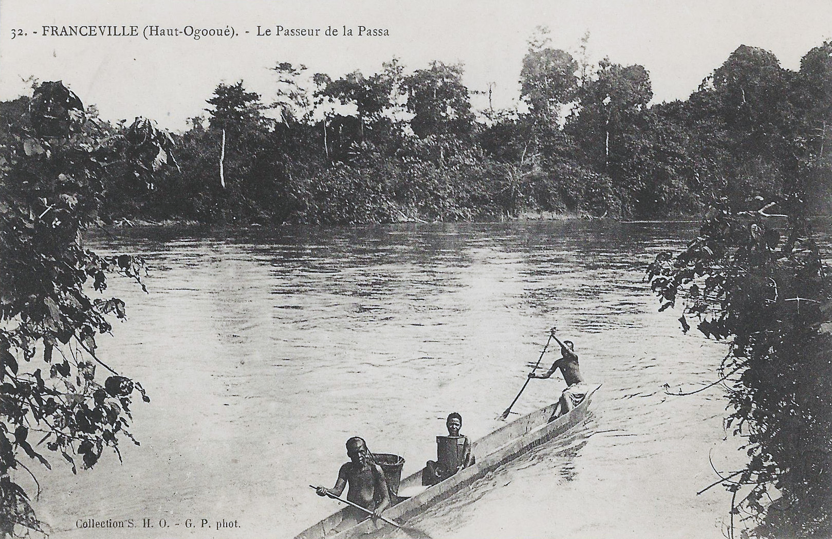 Franceville (Haut-Ogooué). Le passeur de la Passa. Collection S.H.O. G.P. phot.